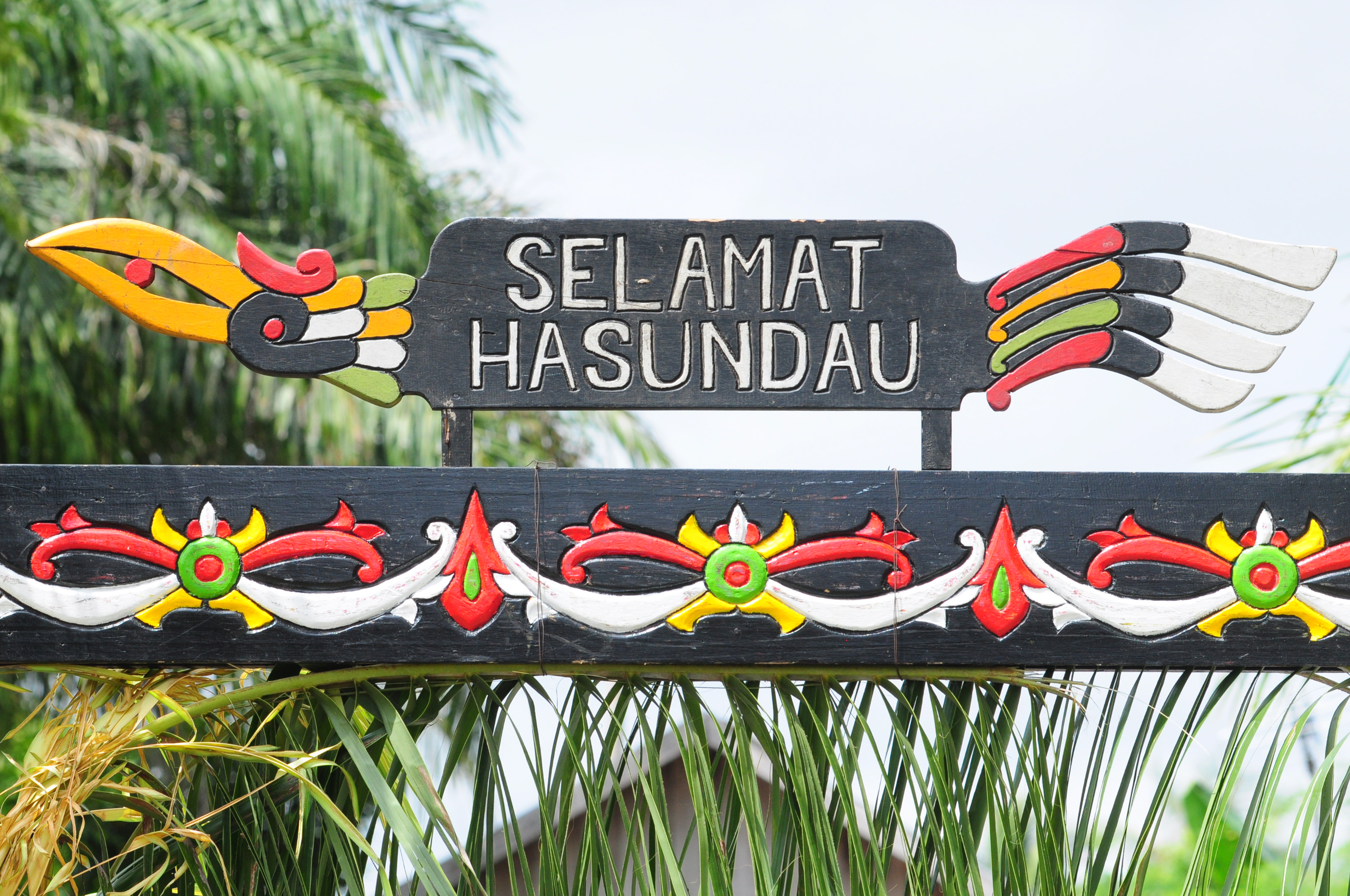 Tulisan Selamat Hasundau (selamat datang) pada tiang gapura